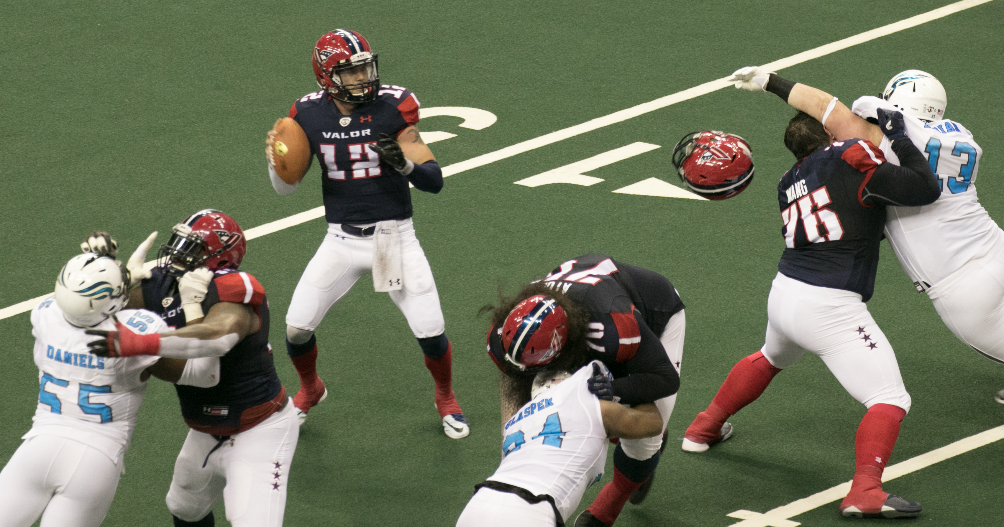 Valor 47/ Philadelphia Soul 48